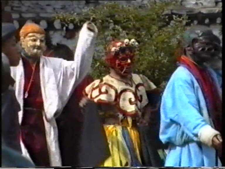 Jakhar City, Tamshing-Lhakang monastery, Bhutan